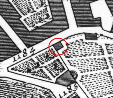 Pianta di Nolli